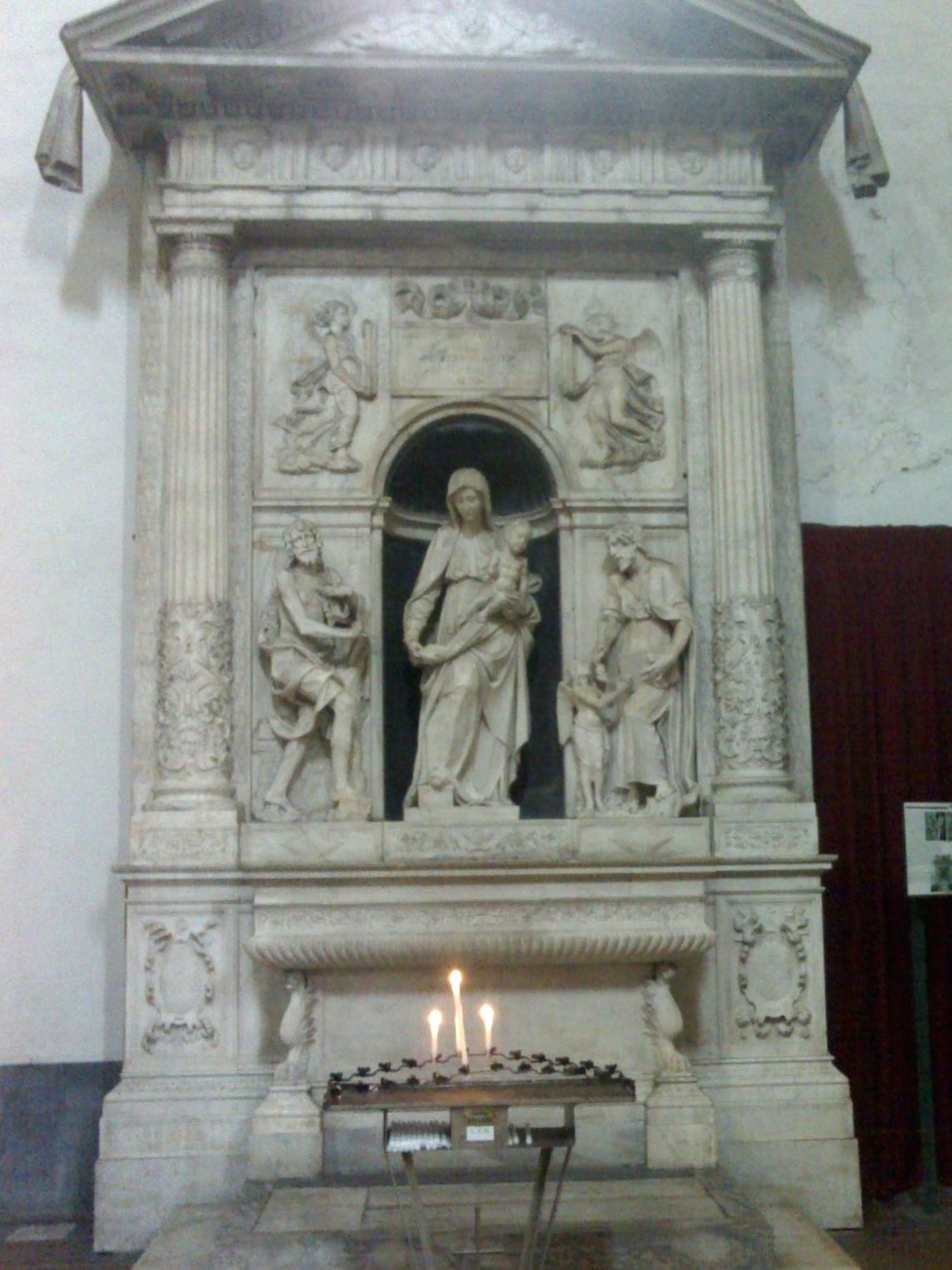 Chiesa di san Domenico Maggiore di Napoli - Scultura nella cappella della Madonna della Neve: l' Ancona marmorea di Giovanni da Nola.